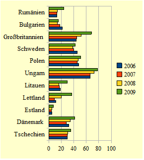 Schuldenquote im Verhältnis zum BIP in % der Nicht-Eurozone